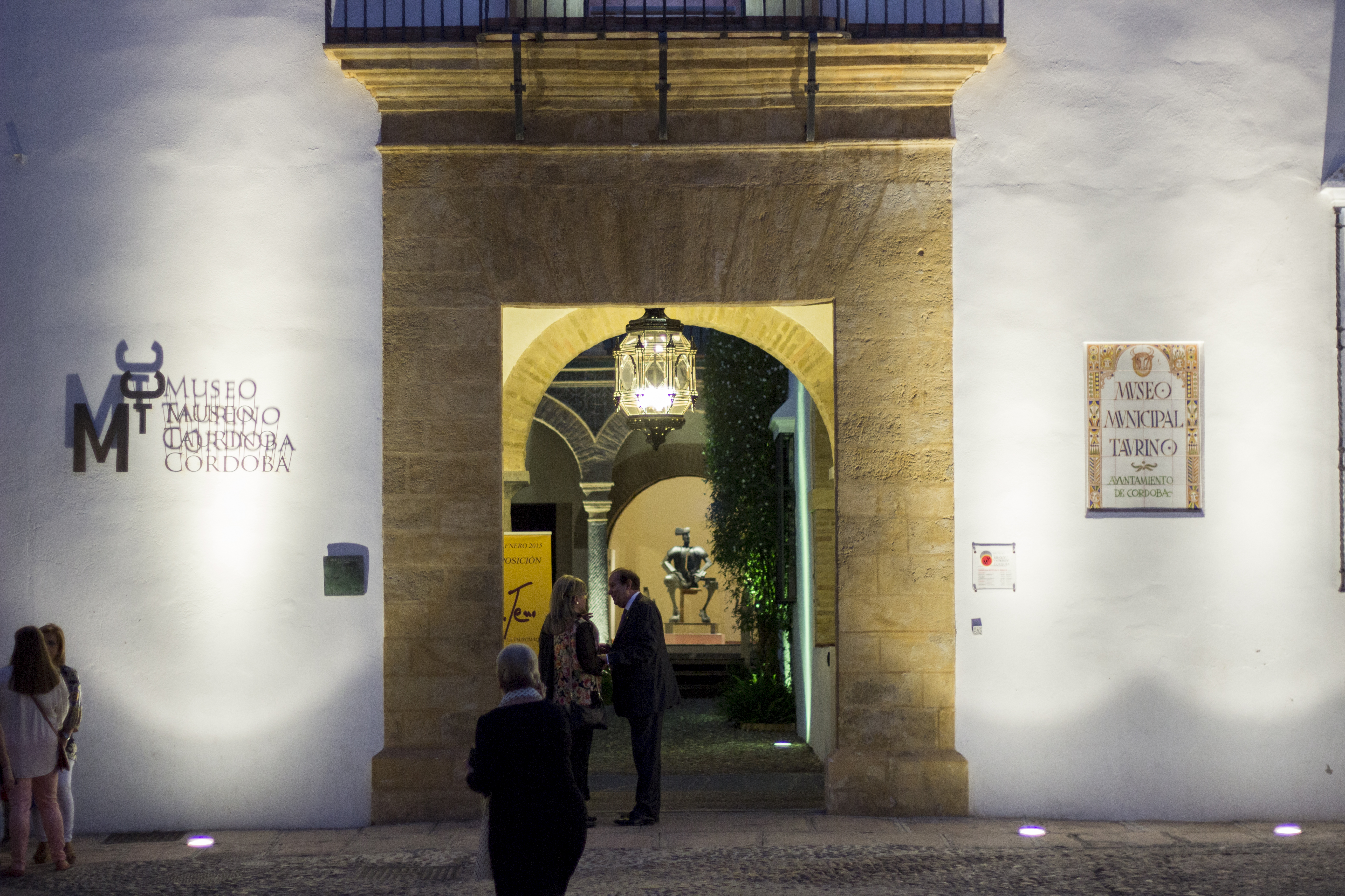 Museo Taurino, Córdoba (España).